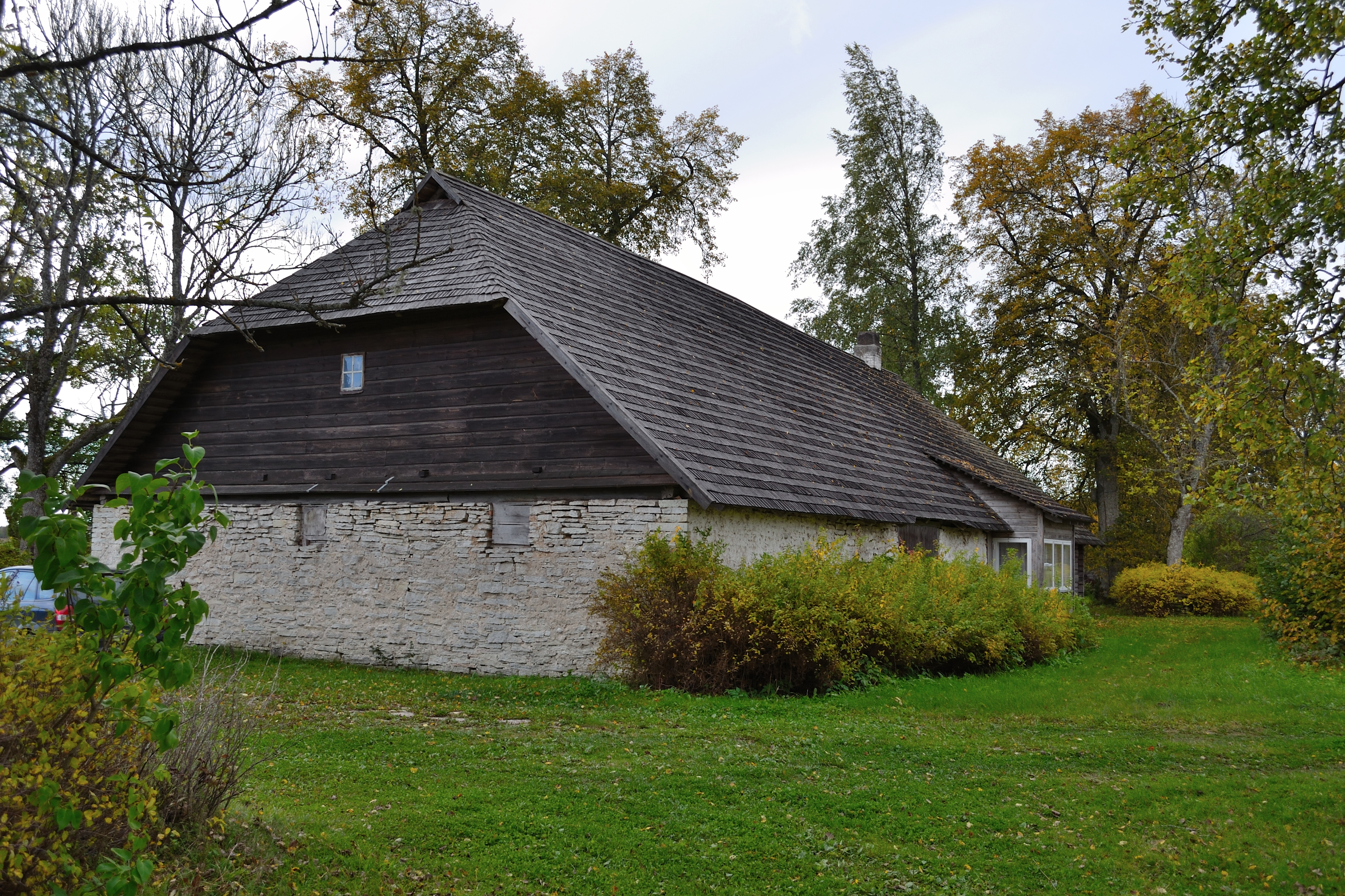 Uku Masingu kodukoht, Einu talu